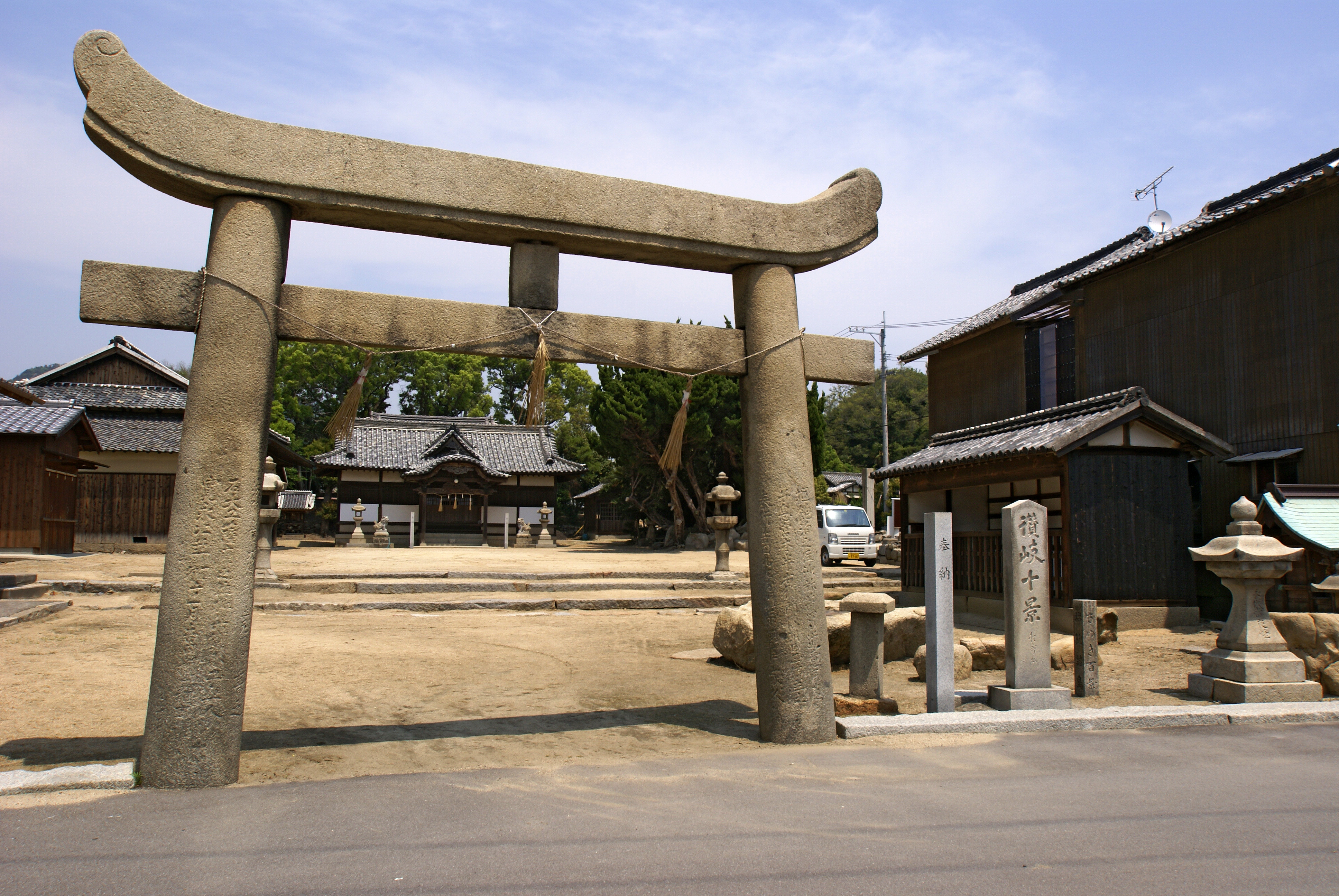 Kogarasu-jinja, Hon-jima of Shiwaku Islands (Marugame, Kagawa prefecture, Japan)